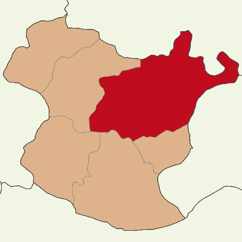 Gümüşhane Merkez ilçesinin konumu